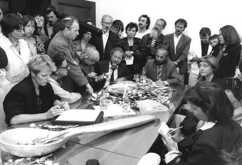 ADN- Senft 17.7.90 Berlin: Kulturprotest- Buchstäblich den Löffel abgegeben haben hunderte Künstler und Kulturschaffende der DDR. Sie protestieren damit gegen die begonnene Kultur-Demontage und den Kahlschlag im DDR-Kulturalltag. Mit Löffelgeklapper vor dem Tagungsraum, in dem Minister Herbert Schirmer (67.v.u.) sich einem Podiumsgespräch mit Kunst-und Kulturschaffenden stellte, unterstützen Künstlerkollegen den Protest.